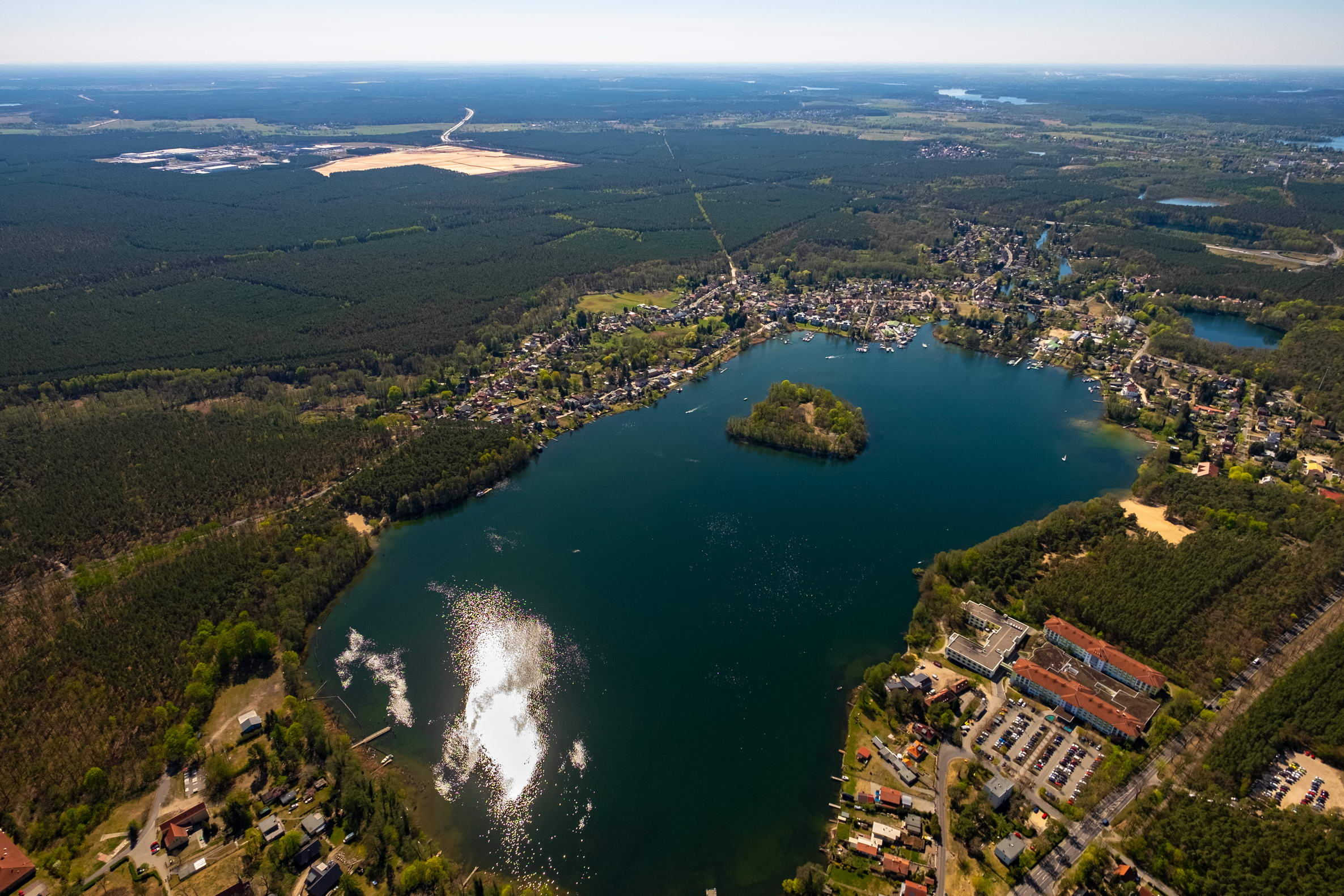 Grünheide, im Hintergrund Baustelle von Tesla